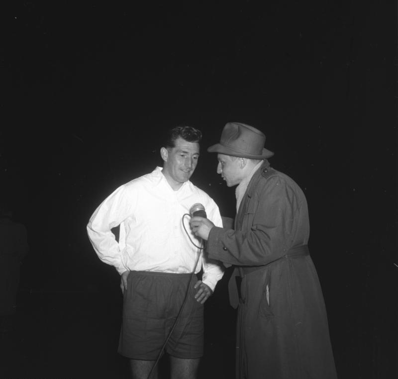 Zentralbild/Franck/Opitz 7.10.1956 SC Wismut Karl-Marx-Stadt unterlag 1. F.C.Kaiserslautern 5:3 Der 2. Fussballgrosskampf am gestrigen Sonnabend, dem 6.10.1956, zwischen dem 1. F.C.Kaiserslautern und dem SC Wismut Karl-Marx-Stadt unter Tiefstrahlern im Leipziger Zentralstadion wurde ein Triumph vor hunderttausend Zuschauer der Lauterer. UBz: Der Mannschaftskapitän der Lauterer Fritz Walter gibt dem Deutschen Fernsehzentrum ein Interview.